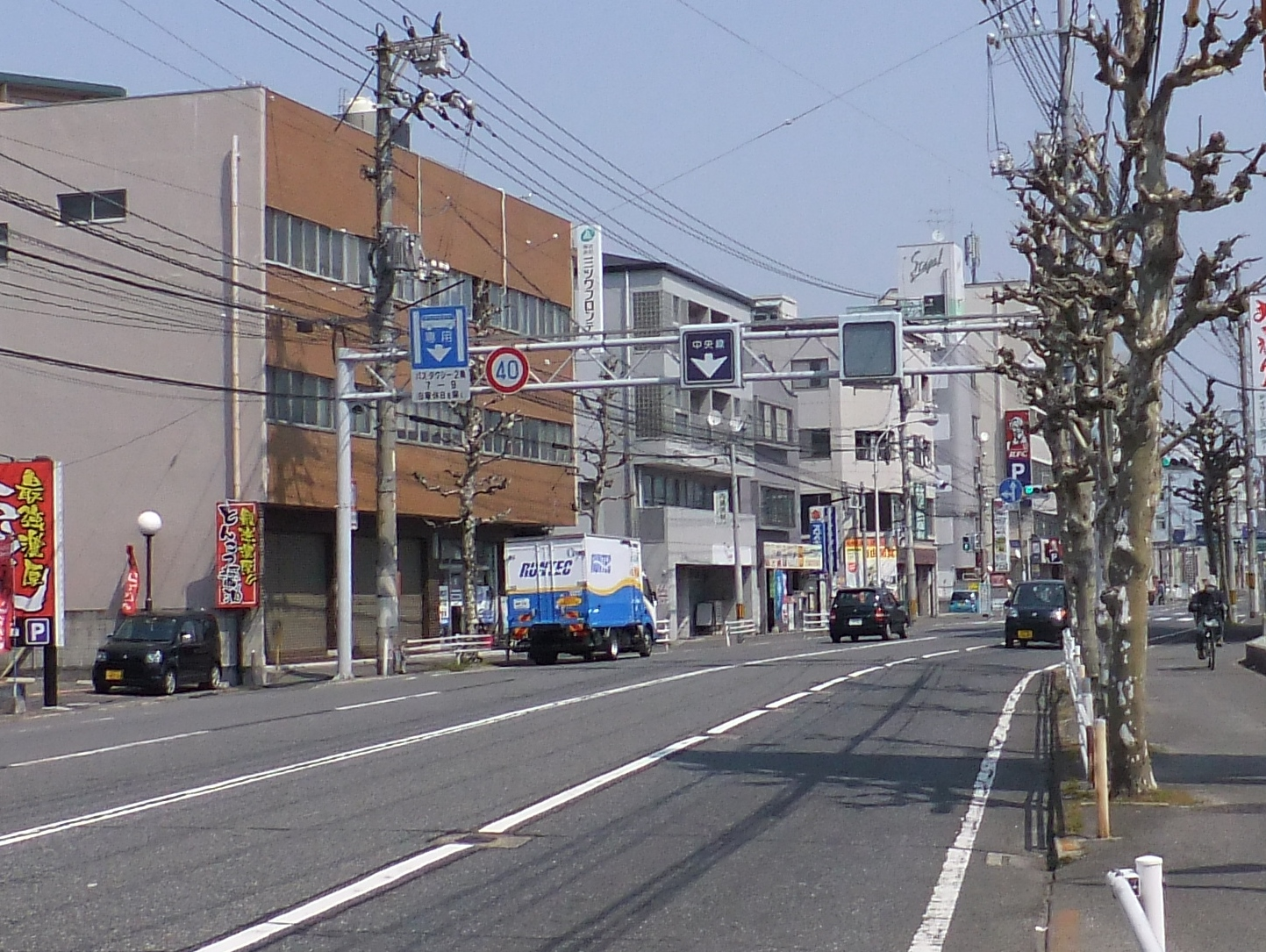 宮島街道・中央変移